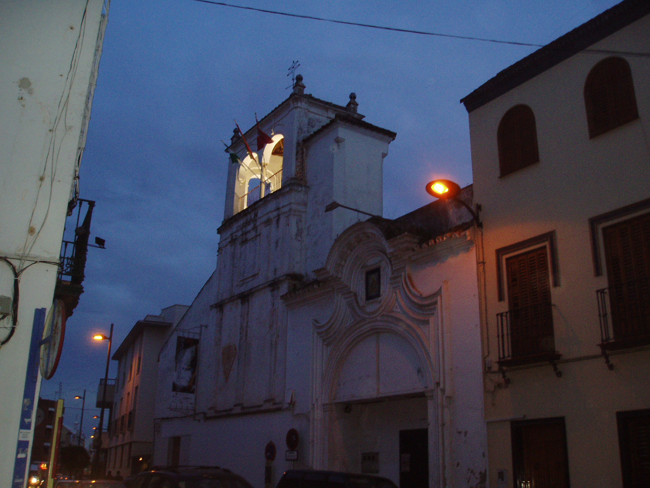 "La almona" antigua hacienda y actual centro de exposiciones